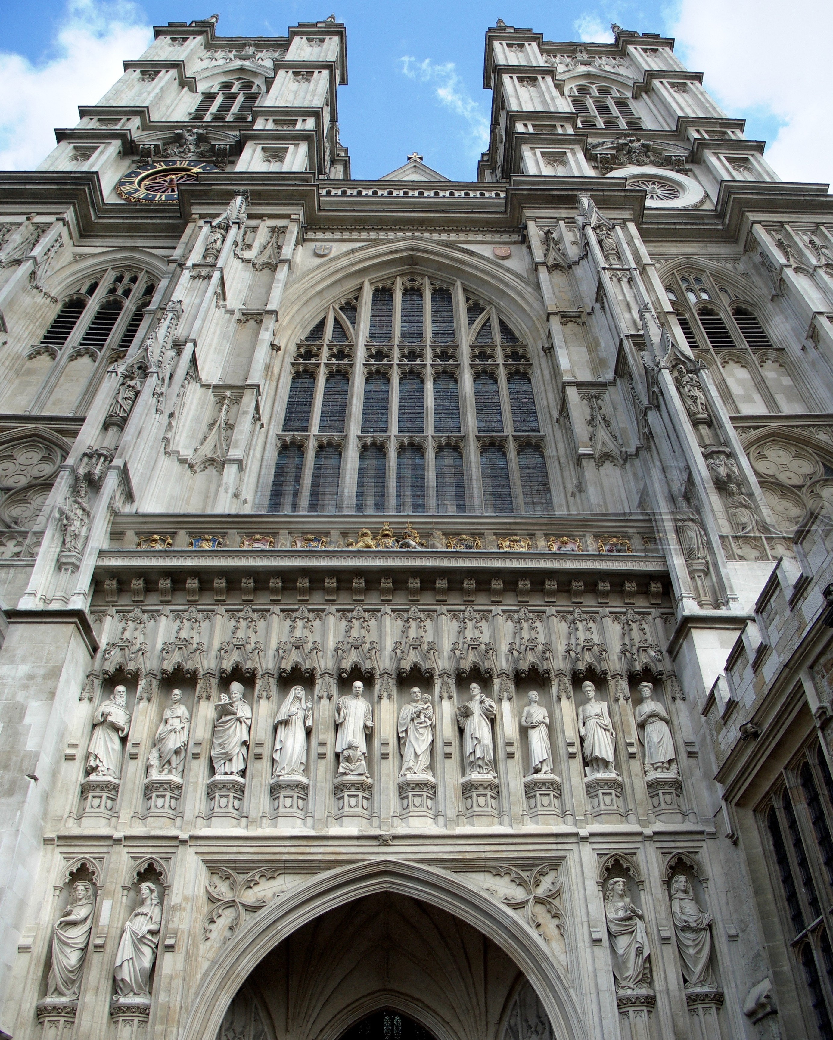 Londres - Abadia de Westminster - Façana